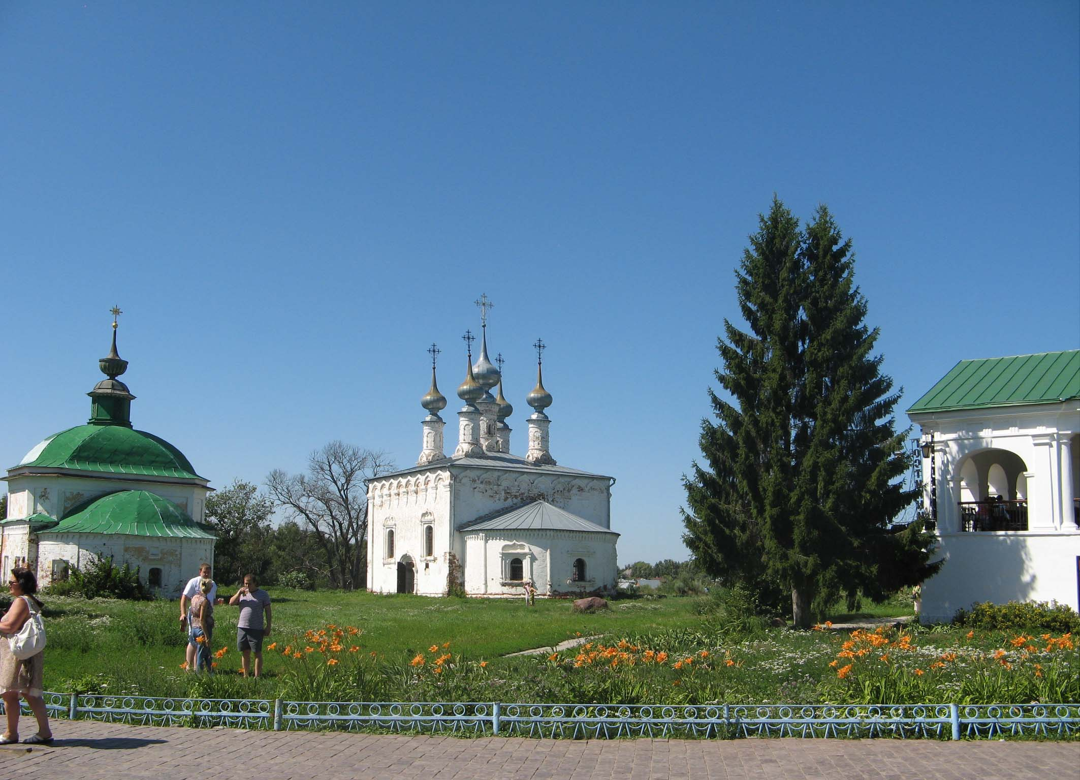 Входоиерусалимская церковь